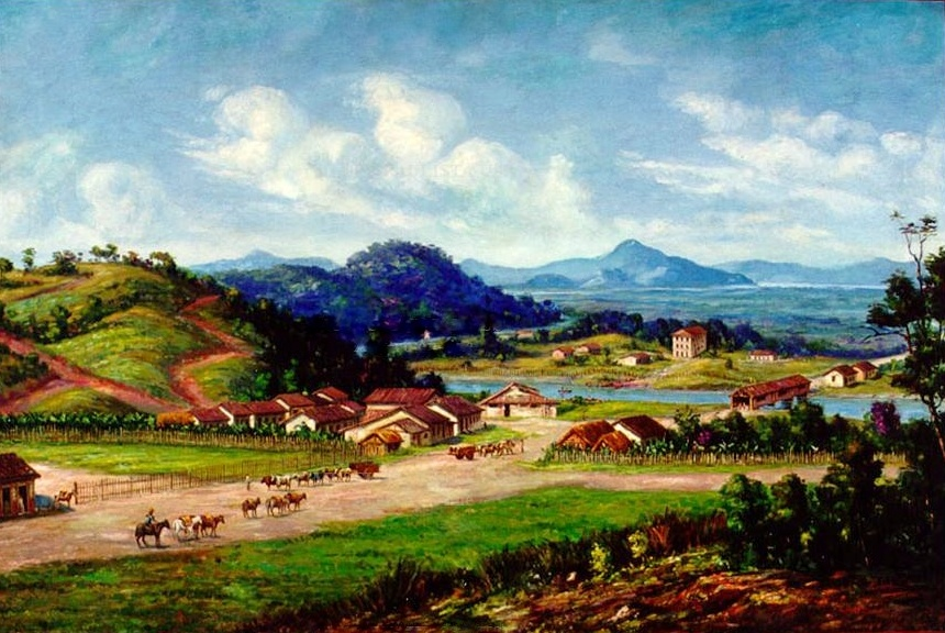 "Cubatão em 1826", por Benedito Calixto (1922). Óleo sobre tela, 120 cm x 81 cm. Acervo do Museu Paulista.